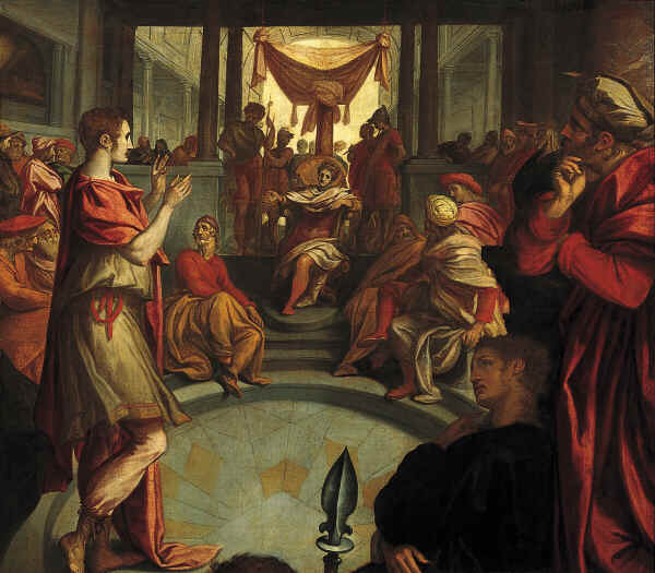 Jozef verklaart de droom van de farao.